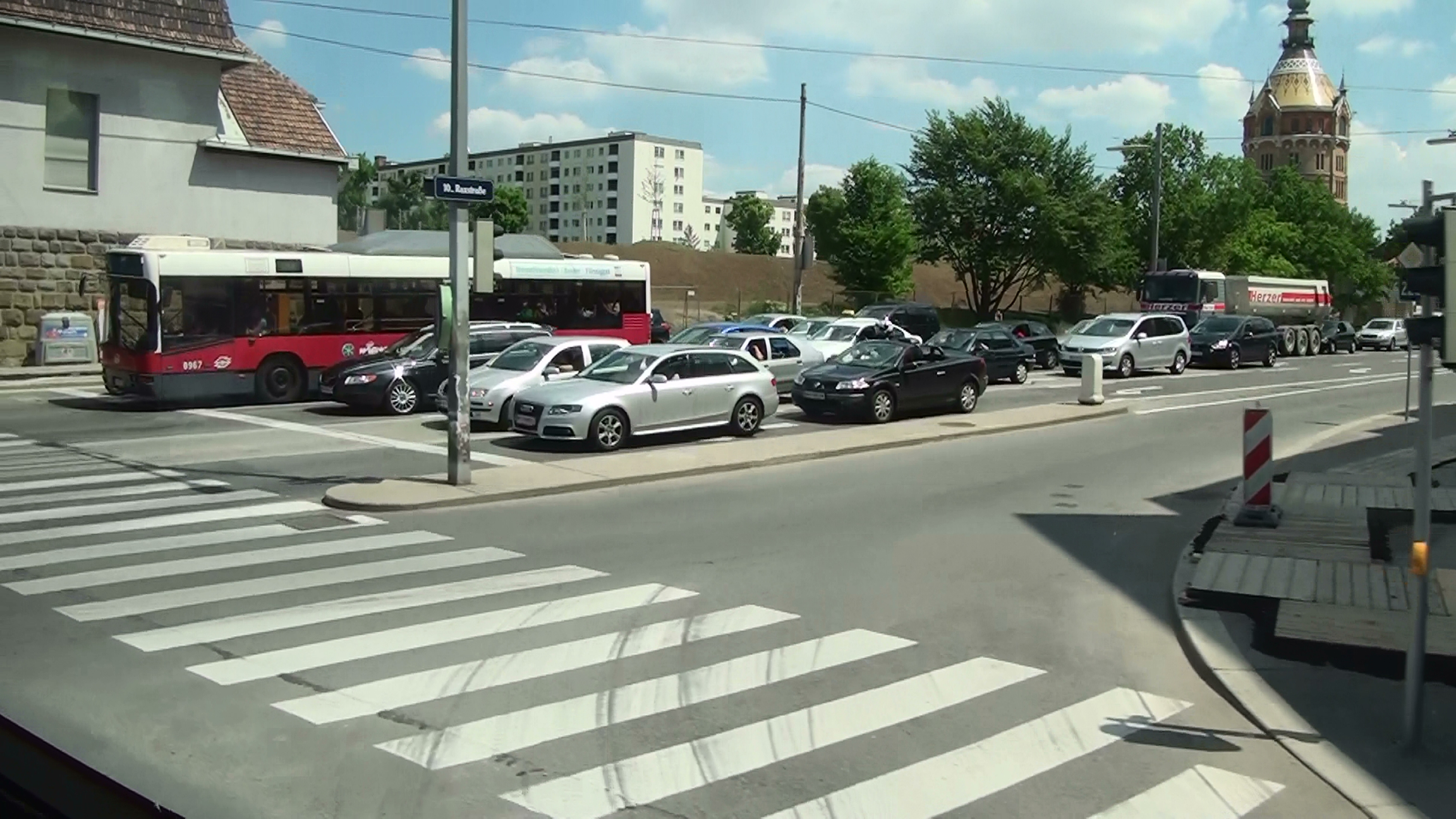 Favoriten, 1100 Wien, Austria